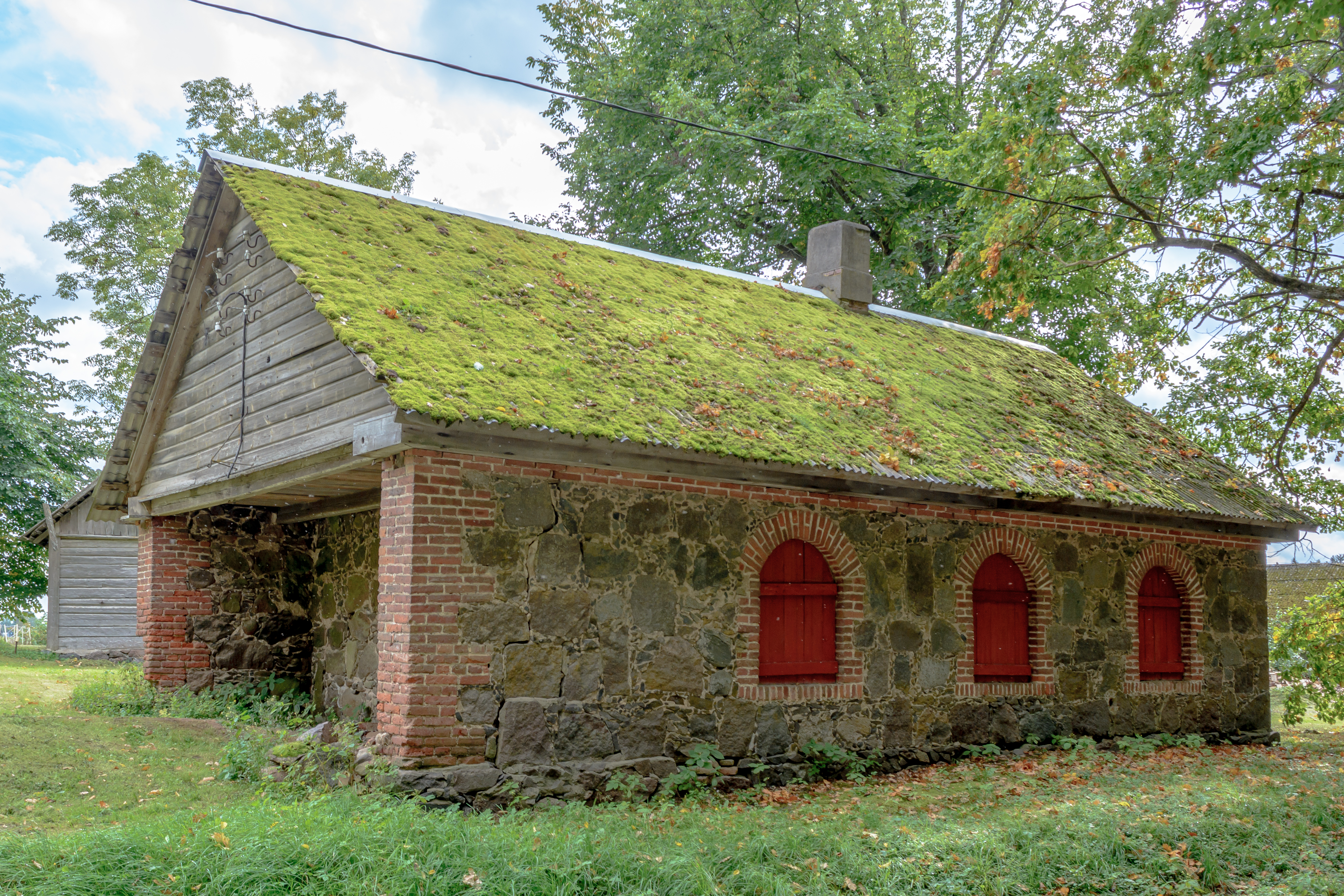 Tusti mõisa sepikoda, 1874.a.